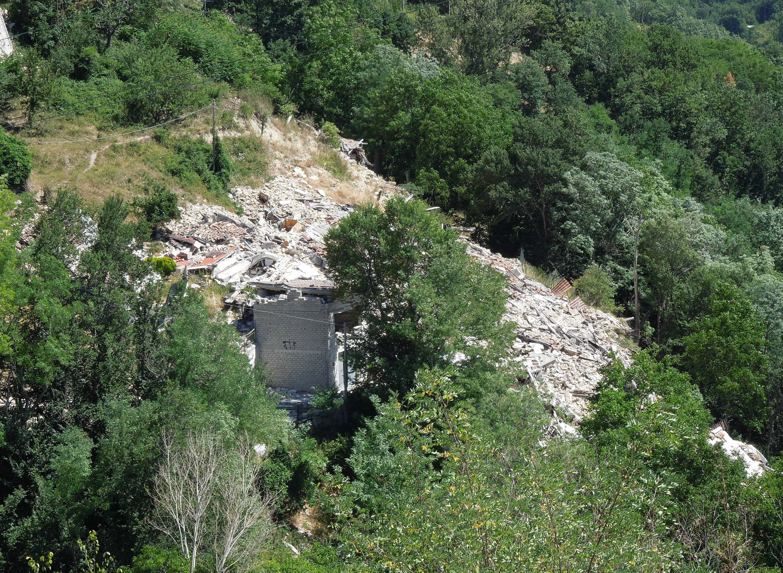 Panorama parziale del paese di Pescara del Tronto (AP) che ritrae le macerie dell'abitato che sorgeva lungo Via dell'Acqua. L'immagine è stata scattata all'interno della zona rossa il 27 luglio 2017.